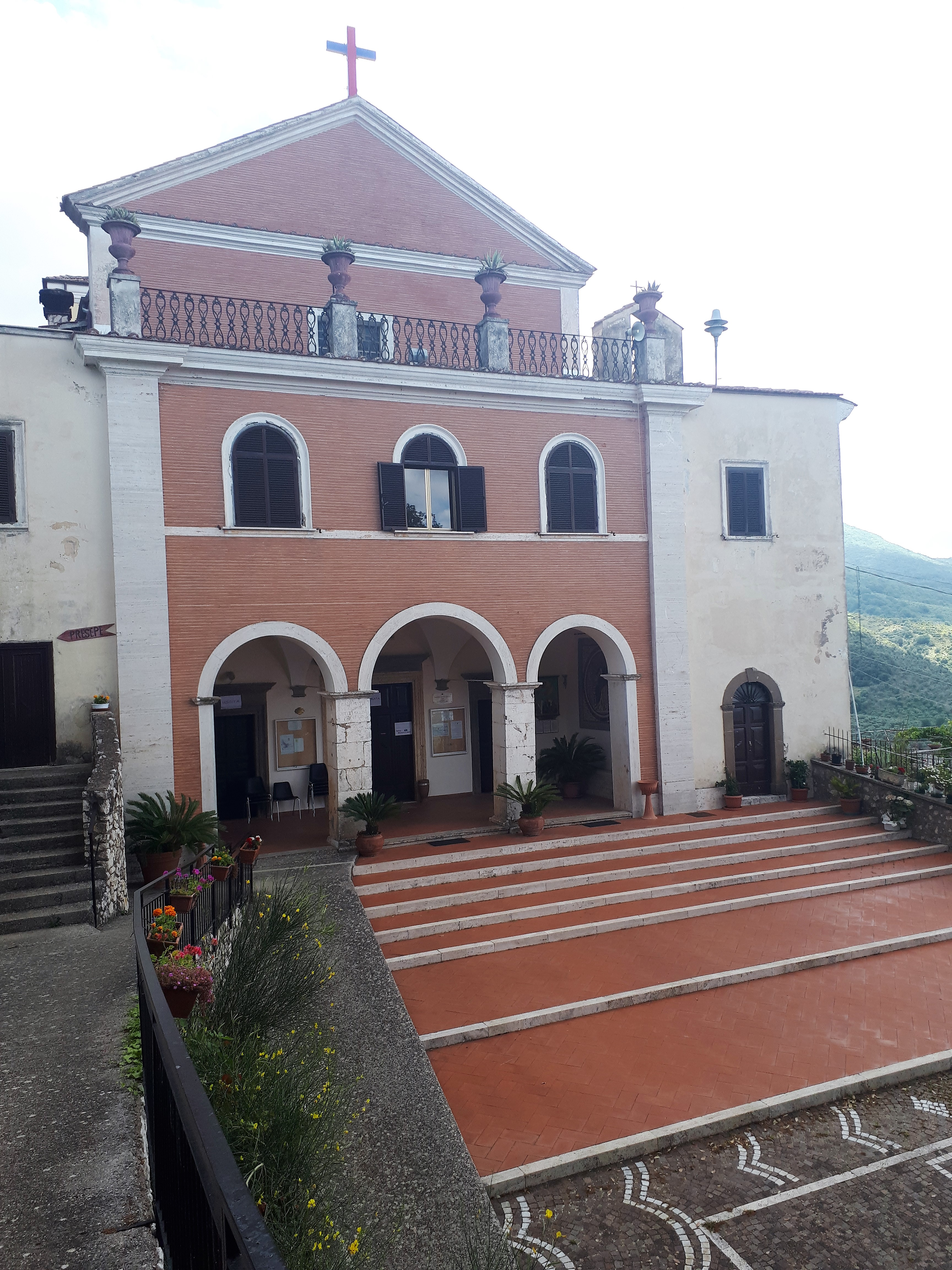 Santuario della Madonna del Soccorso, Cori, Lazio, Italia